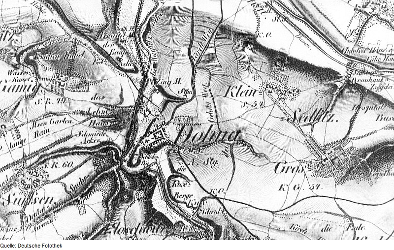 Original image description from the Deutsche Fotothek Dohna. Oberreit, Sect. Dresden, 1821/22